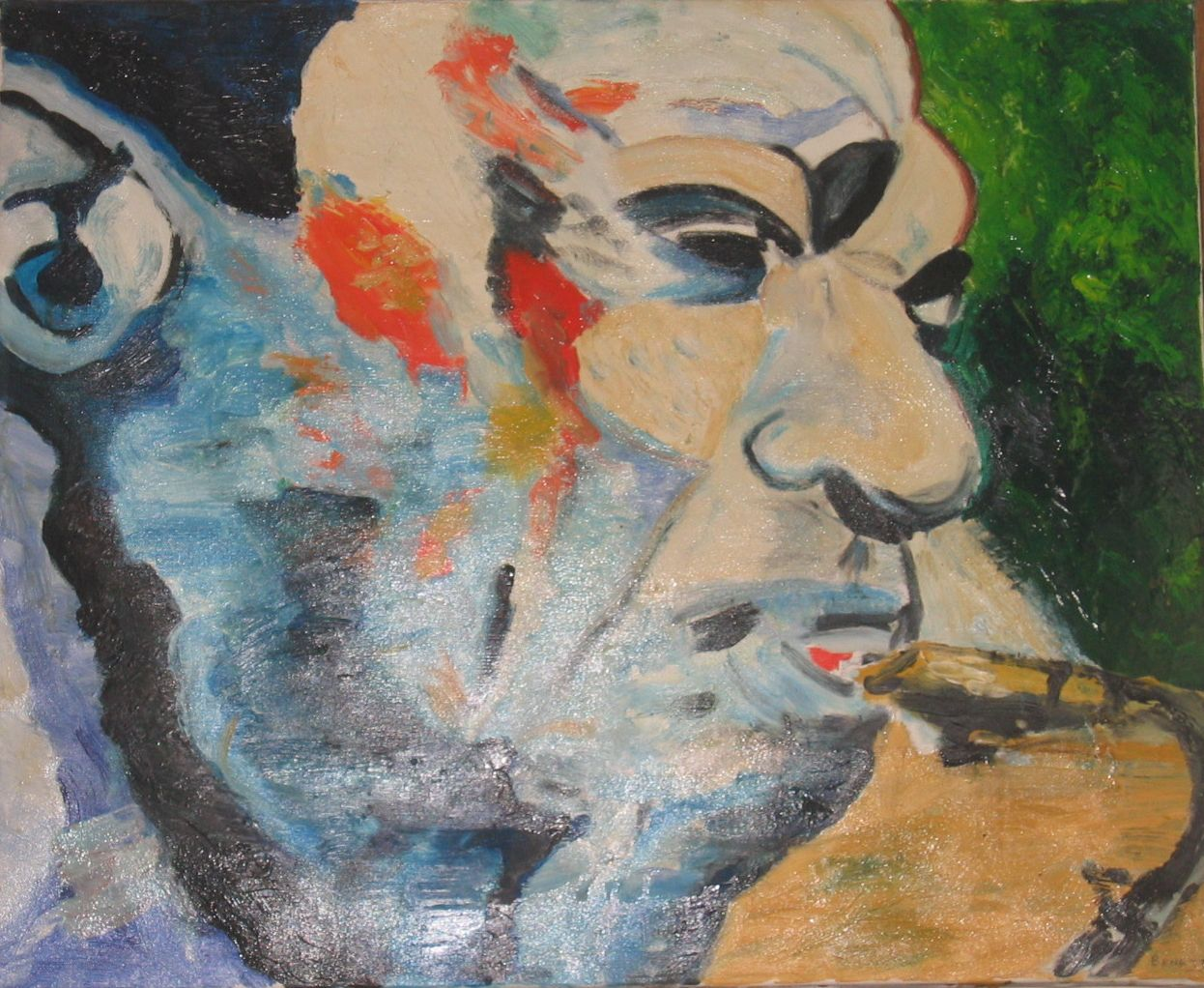 peinture de jjb91 de john coltrane 2009